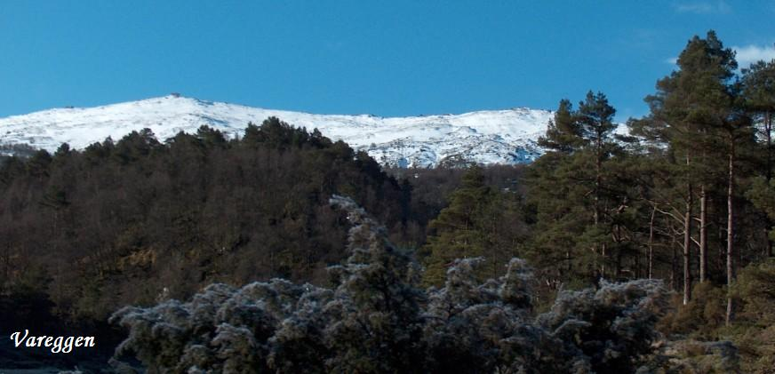 Vareggen